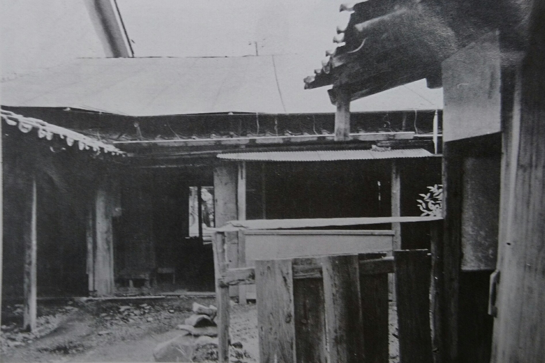 津山市の史跡「箕作阮甫旧宅」の解体復原工事前